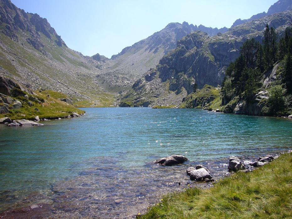 Coret de Oelhacrestada vist des de l'Estanh deth Cap deth Pòrt; Naut Aran, Vall d'Aran, Catalunya